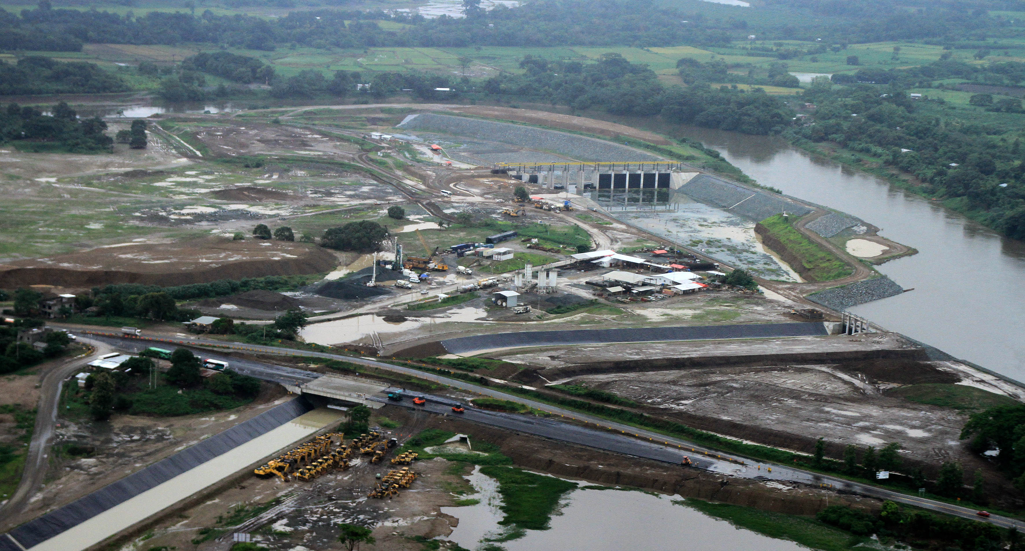 Guayaquil, jueves 29 de enero del 2015 (ANDES).-Con una inversión que alcanza los 270 millones de dólares, el proyecto trasvase Daule-Vinces (DAUVIN) beneficiará a 172 mil habitantes de las provincias de Guayas y Los Rios Foto:César Muñoz/ANDES